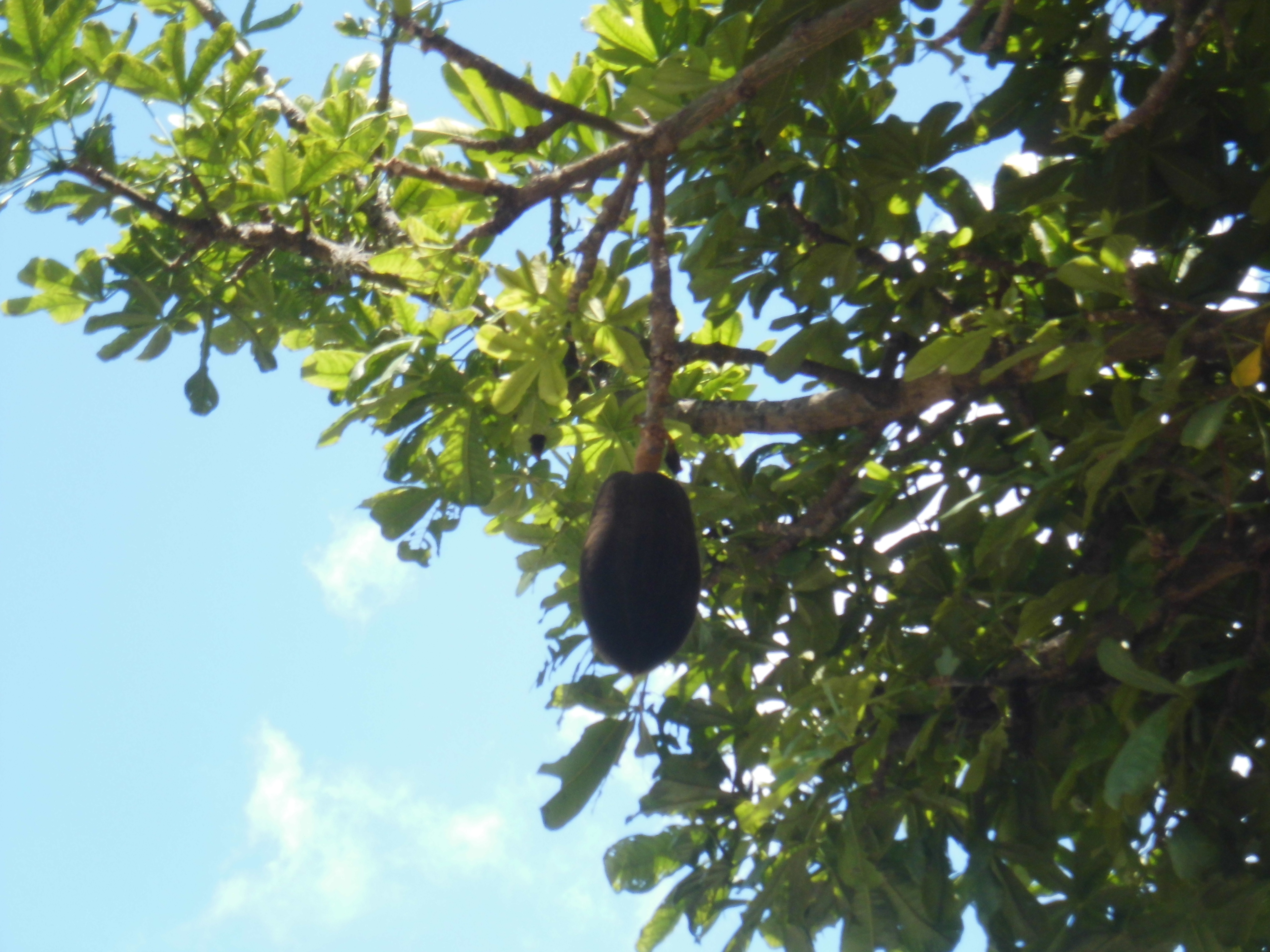 Pachira insignis (Sw.) Savigny - La Tahona, municipio Baruta, estado Miranda - Venezuela.